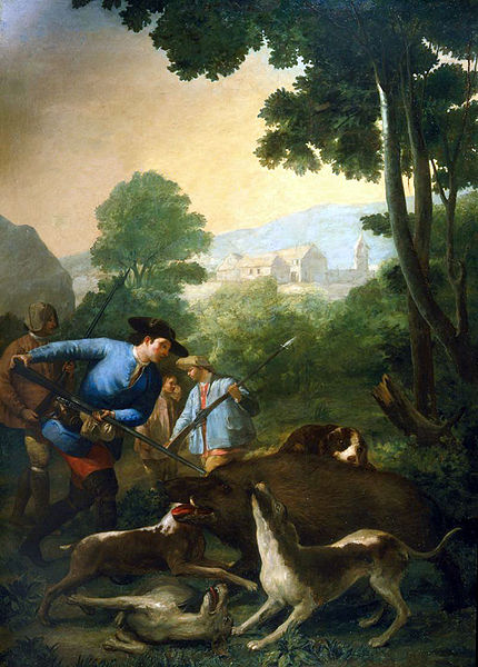 Cartones para tapices.